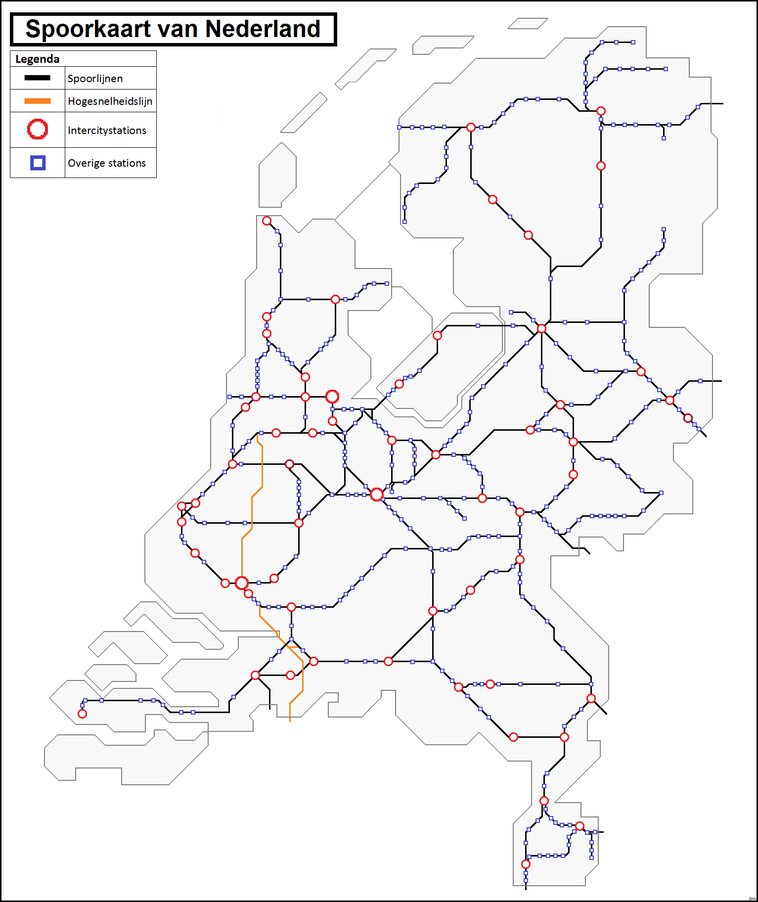 Een kaart met alle spoorlijnen in Nederland + stations.